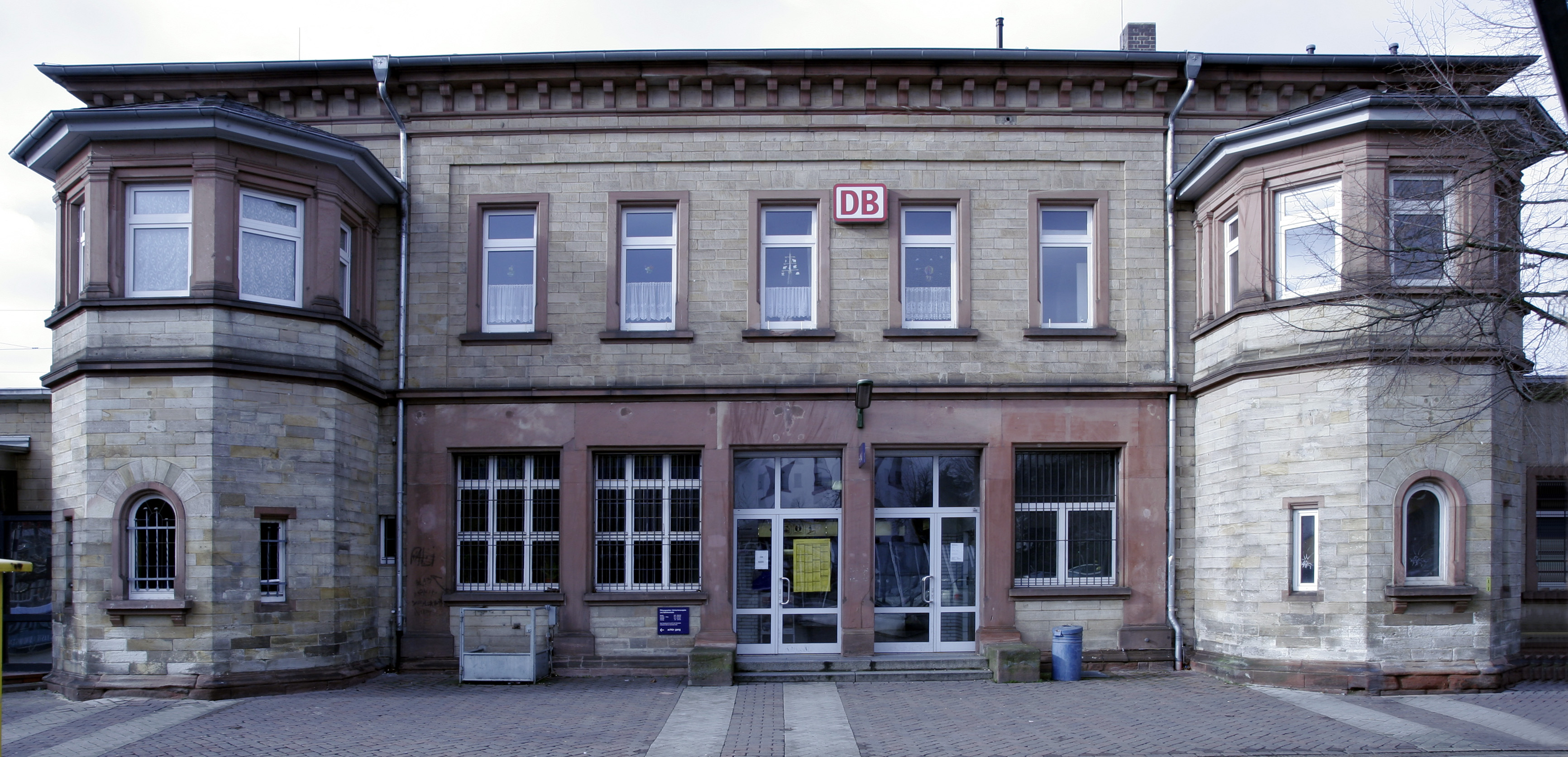 Bahnhof Bensheim im Februar 2007/Bensheim Railway Station in Bensheim, Germany